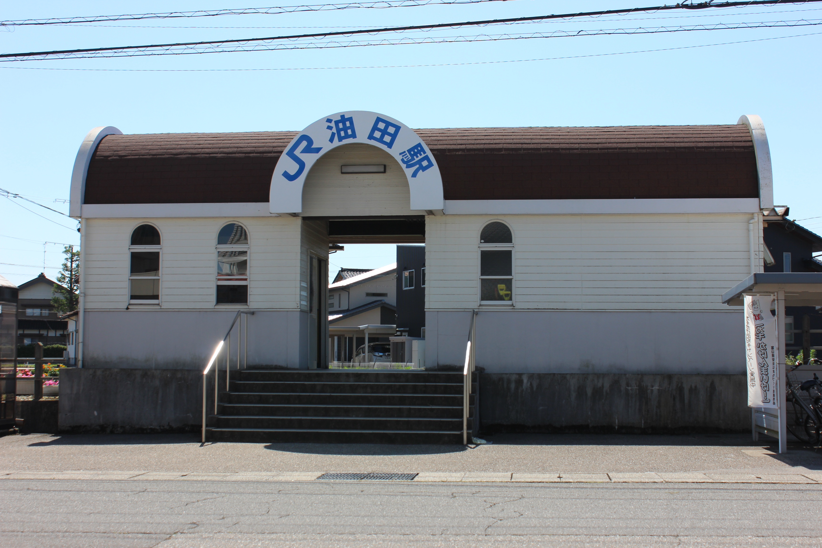 油田駅（富山県砺波市） Canon EOS Kiss X5